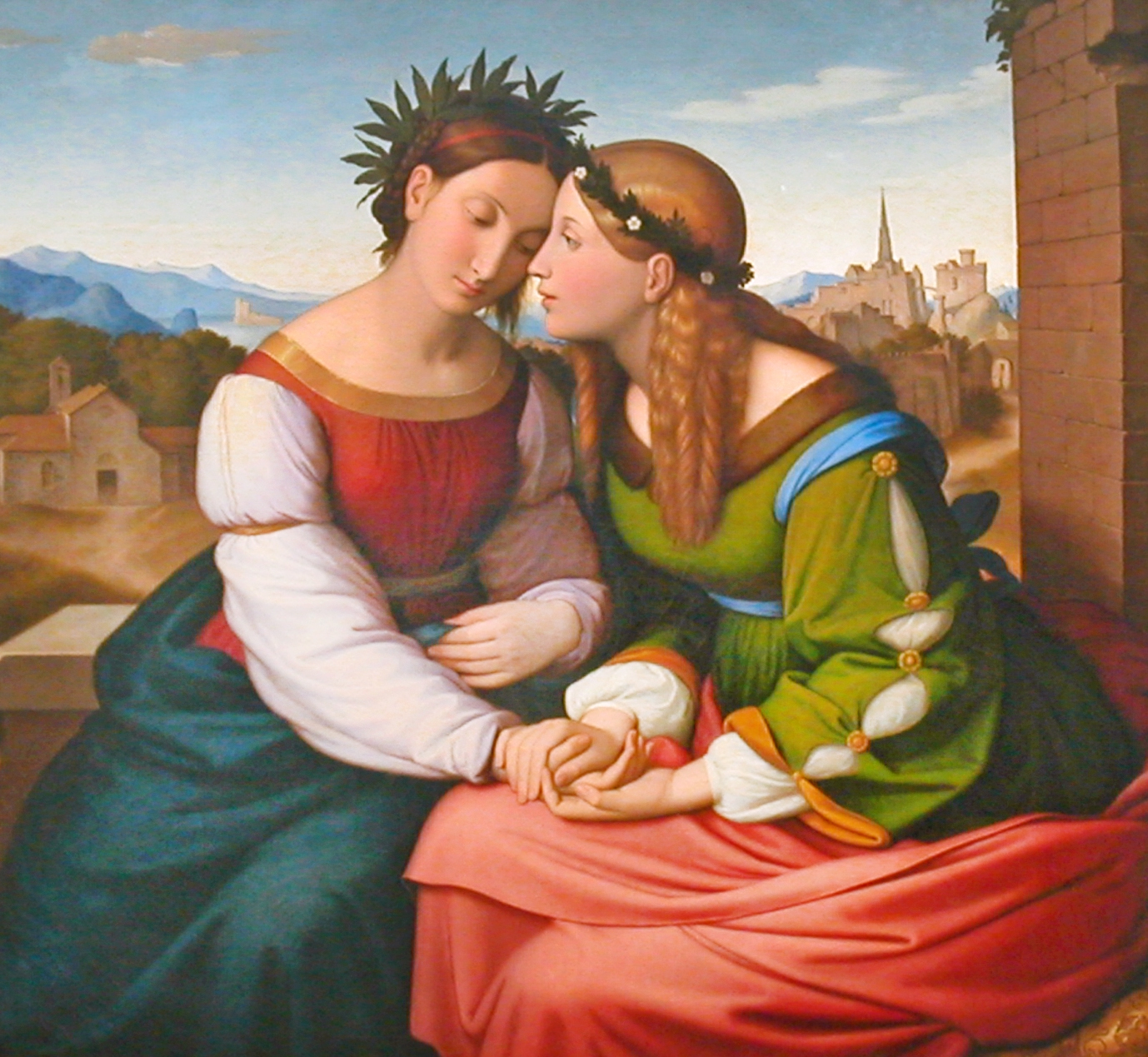 Italie et Allemagne oeuvre de Friedrich Overbeck (1789-1869) 1828 Huile sur toile F. Overbeck appartenait au Groupe des Nazaréens. Ce surnom avait été donné par les Italiens, par dérision, aux jeunes artistes allemands installés, dès 1810, à Rome et qui voulaient s'inspirer de Dürer et de Raphaël pour renouveler l'art de leur époque. Nouvelle pinacothèque de Munich Cette oeuvre n'est pas présentée dans l'exposition "De l'Allemagne, 1800-1939. De Friedrich à Beckmann" au musée du Louvre à Paris mais il y figure un dessin du même artiste sur le même thème (qu'il est interdit de photographier). Du 28 Mars 2013 au 24 Juin 2013 Riche de plus de deux cents oeuvres, l’exposition propose une réflexion autour des grands thèmes structurant la pensée allemande de 1800 à 1939. Elle replace la production artistique et les artistes, de Caspar David Friedrich à Paul Klee, de Philipp Otto Runge à Otto Dix, dans le contexte intellectuel de leur création et les confronte aux écrits des grands penseurs, au premier rang desquels figure Goethe.